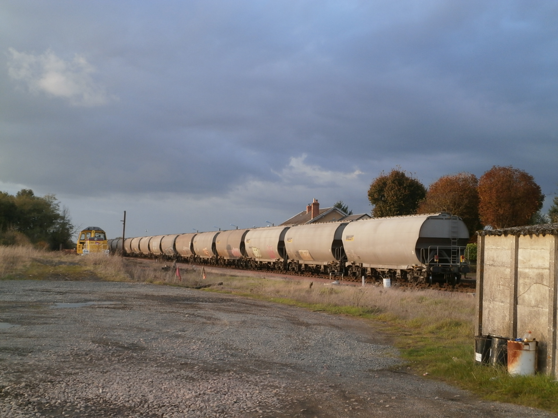 train de wagons de céréales en gare de Reignac-sur-Indre